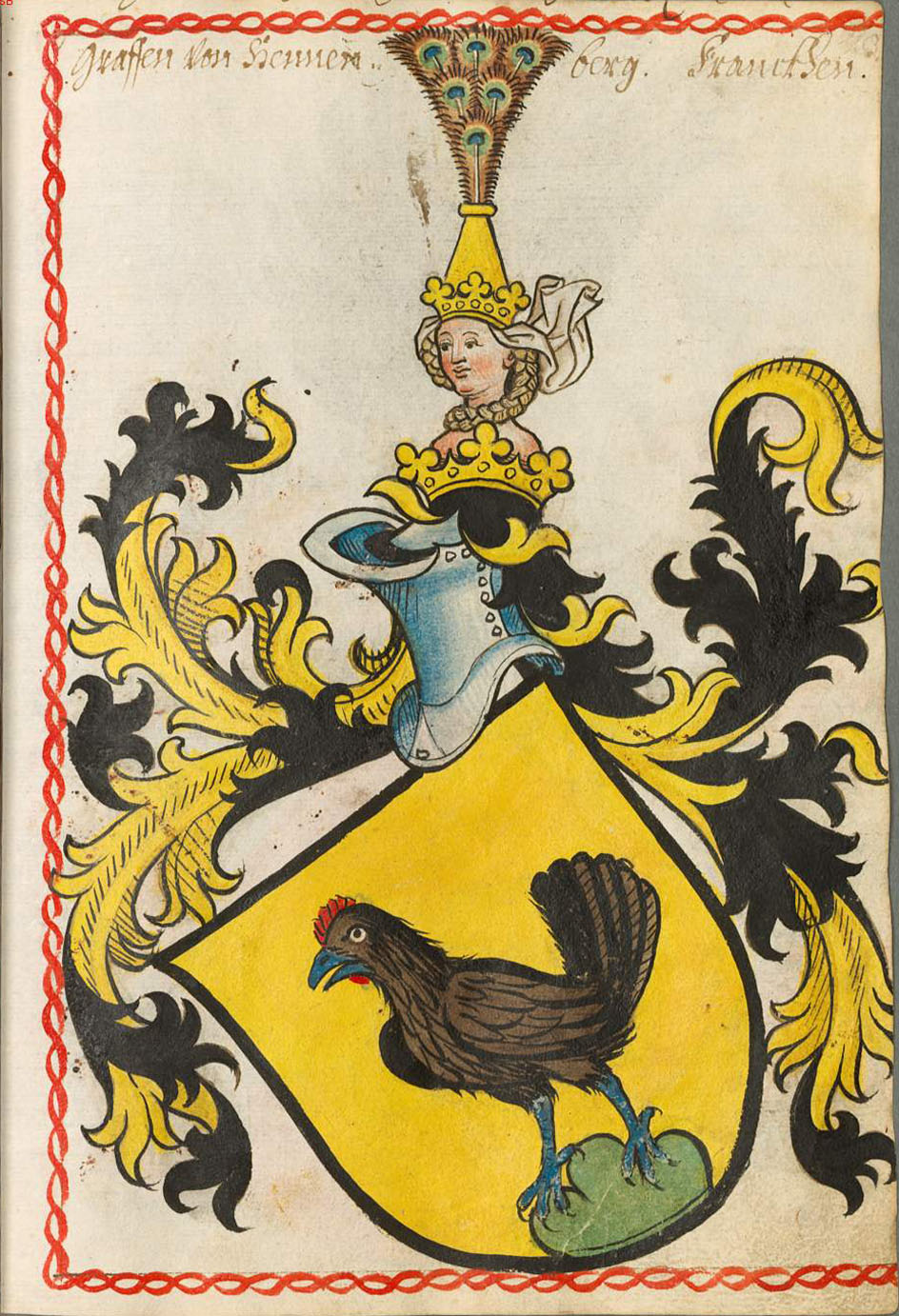 Scheibler'sches Wappenbuch , älterer Teil Henneberg